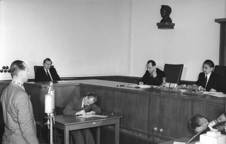 Zentralbild/ Quaschinsky 23.5.52 Prozeß gegen Agentengruppe Vor dem Obersten Gericht der DDR begann am 23.5.52 ein Prozeß gegen eine Bande von Agenten und Saboteuren, die sämtlich der westberliner Hildebrandt-Gruppe gegen die Unmenschlichkeit angehören. Unter anderem planten die Angeklagten, die Eisenbahnbrücke in Berlin-Erkner mit dem darüber fahrenden "Blauen Express" zu sprengen. UBz: Der Bandenführer Johann Burianek während der Beweisaufnahme